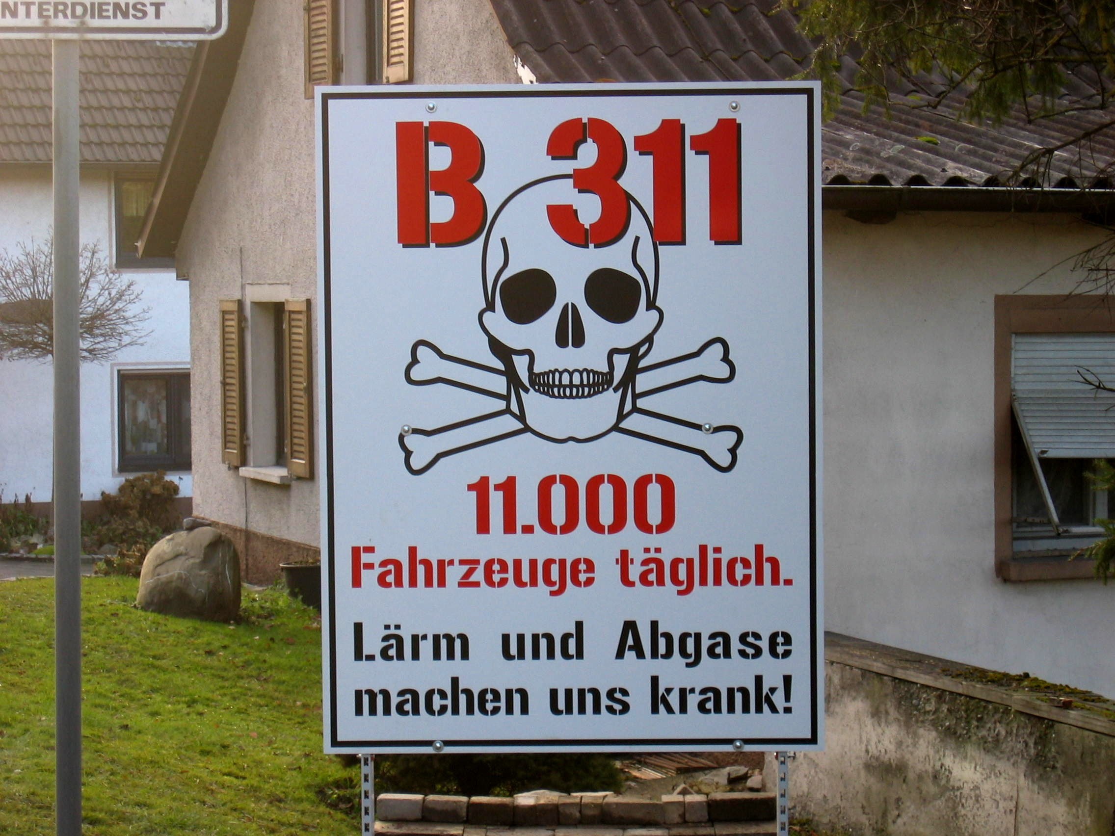 Protesttafel der Bügerinitiative Göggingen an der Bundesstraße 311 (Ortseinfahrt aus Richtung Krauchenwies)